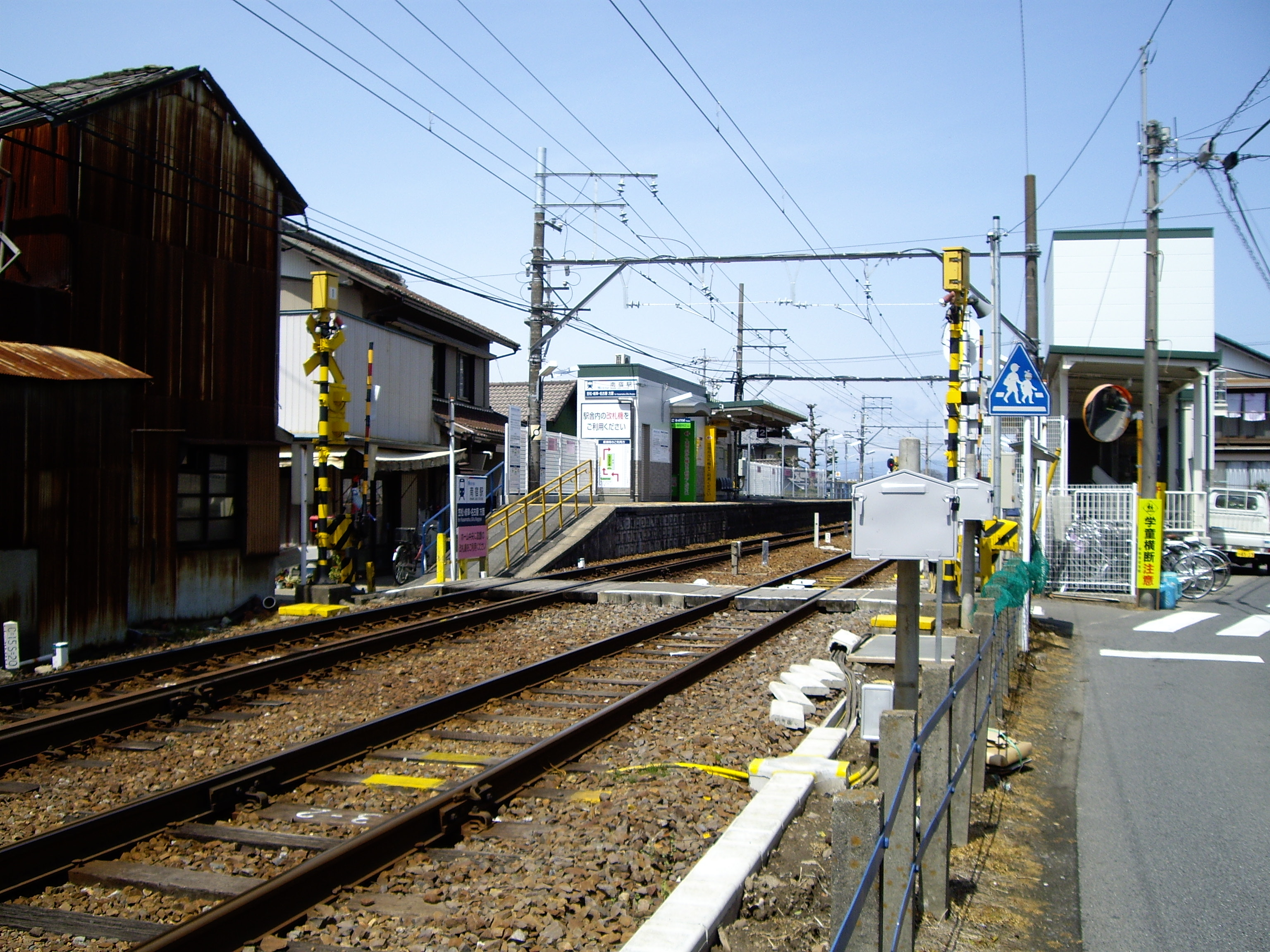 Minamijuku Station(南宿駅)